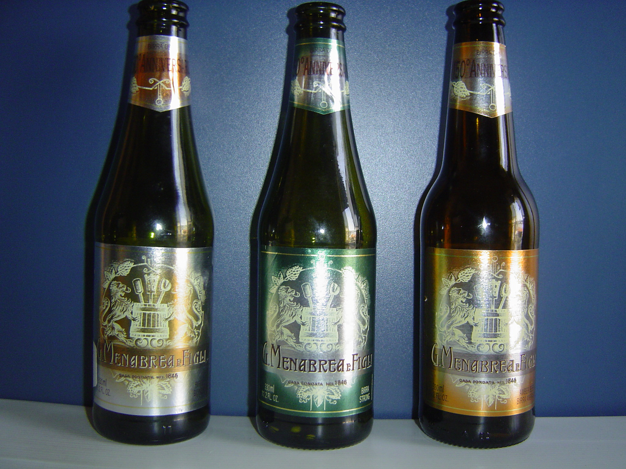 Bottiglie di Birra Menabrea prodotte per il 150° Anniversario